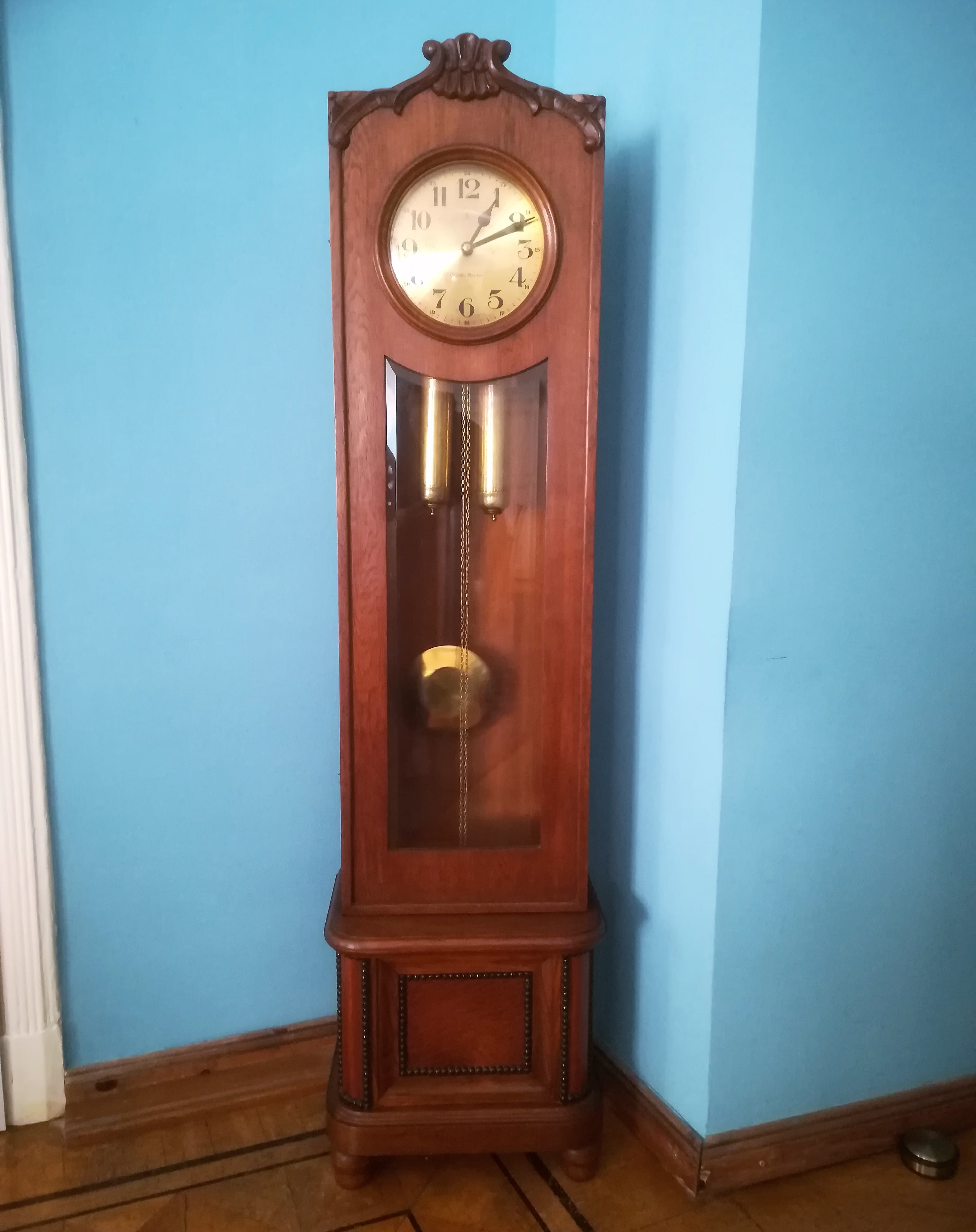 Zegar Gustava Beckera w Urzędzie Miejskim w Poznaniu.